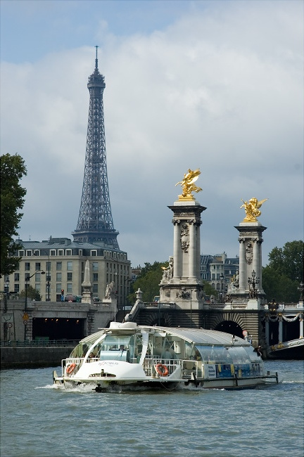 Paris: perspective de la Seine avec un bateau-mouche, le Pont Alexandre III et la Tour Eiffel